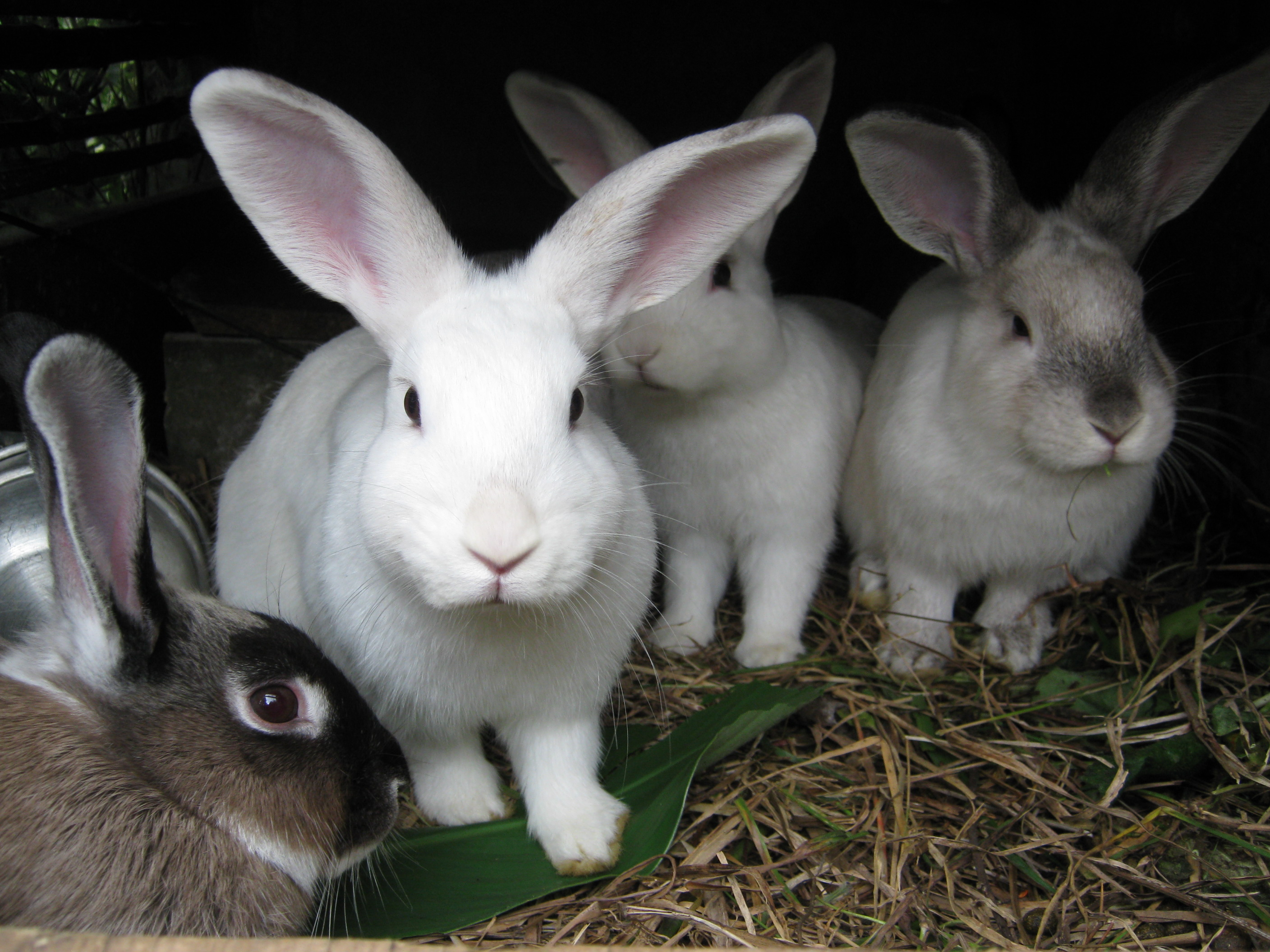 Gazapos, conejos pequeños en una conejera a tablas ideal para coneajas en embarazo.